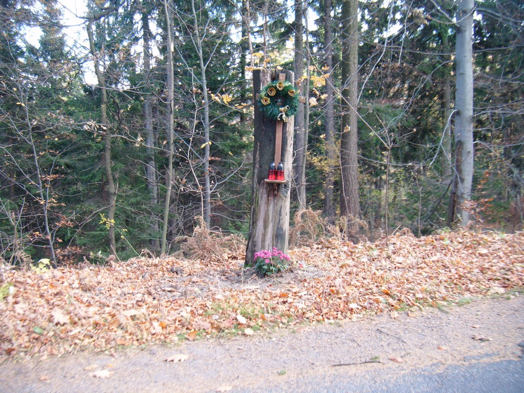 Drzewo - pomnik ofiary wypadku